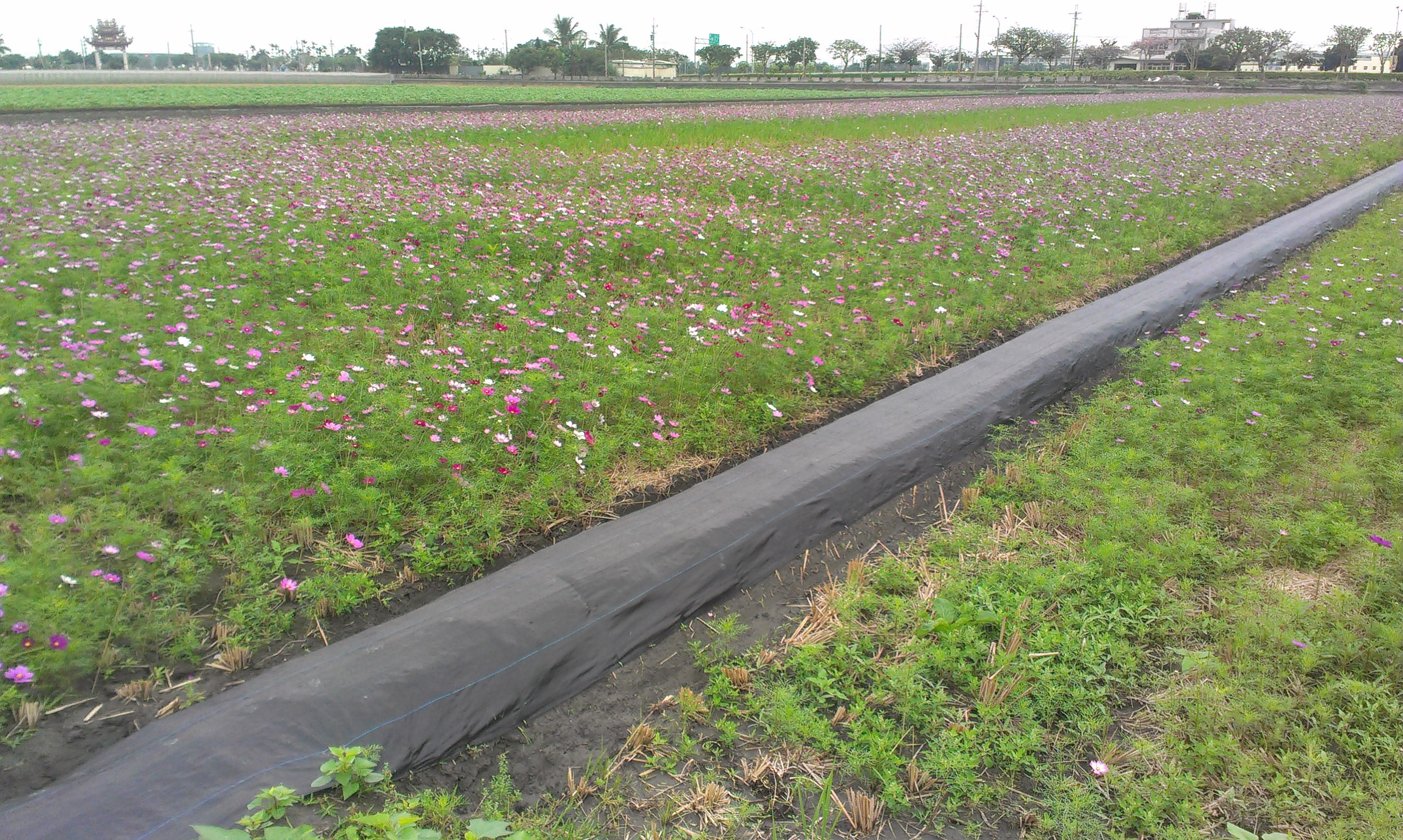 647, Taiwan, 雲林縣莿桐鄉興桐村